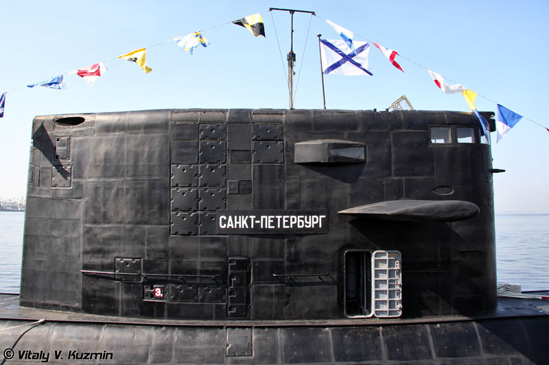 Дизель-электрическая подводная лодка Б-585 Санкт-Петербург проекта 677 Лада (B-585 Sankt-Peterburg project 677 Lada class diesel-electric submarine)